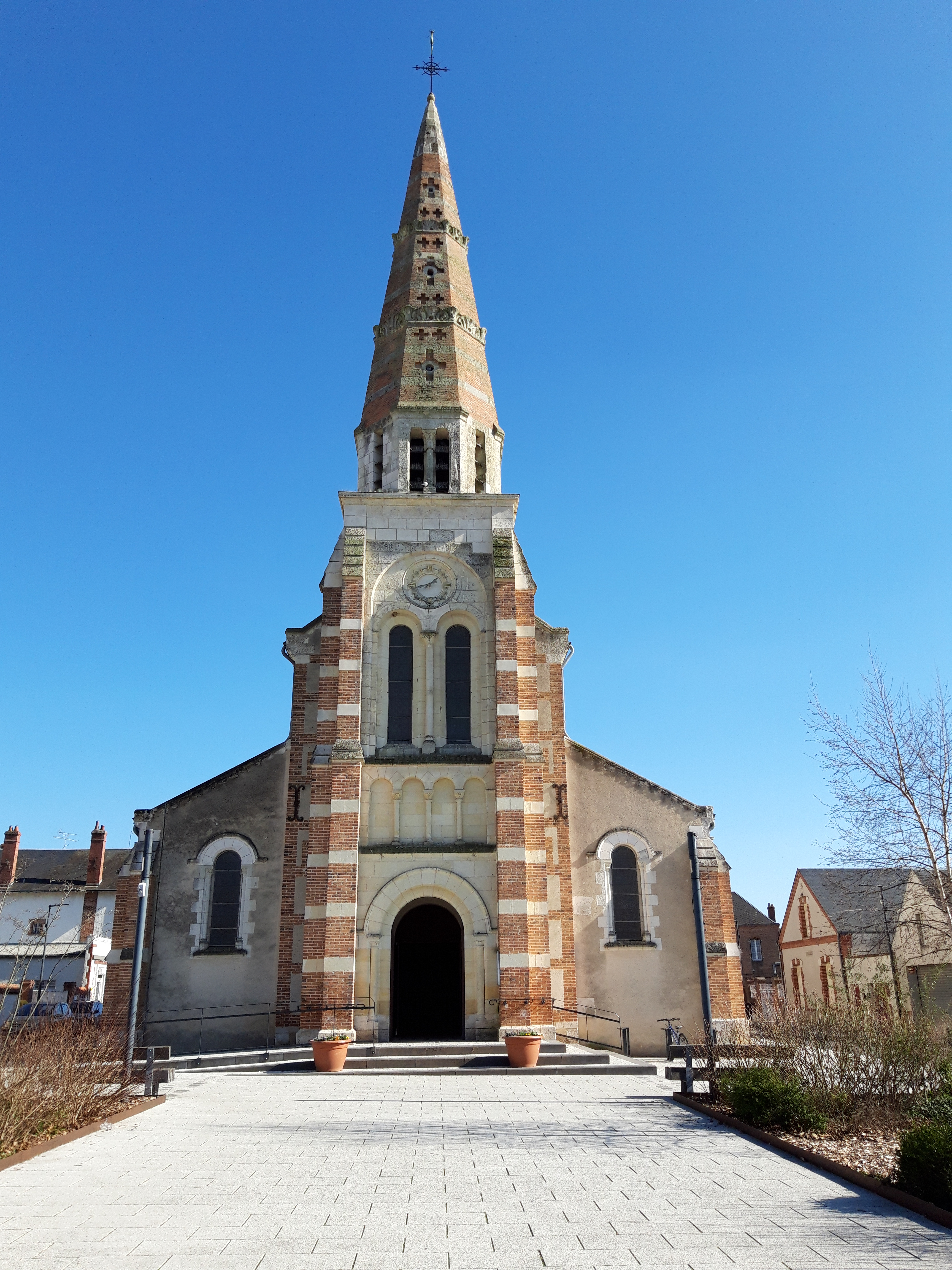 Napoléon III a contribué généreusement à la reconstruction de l'église